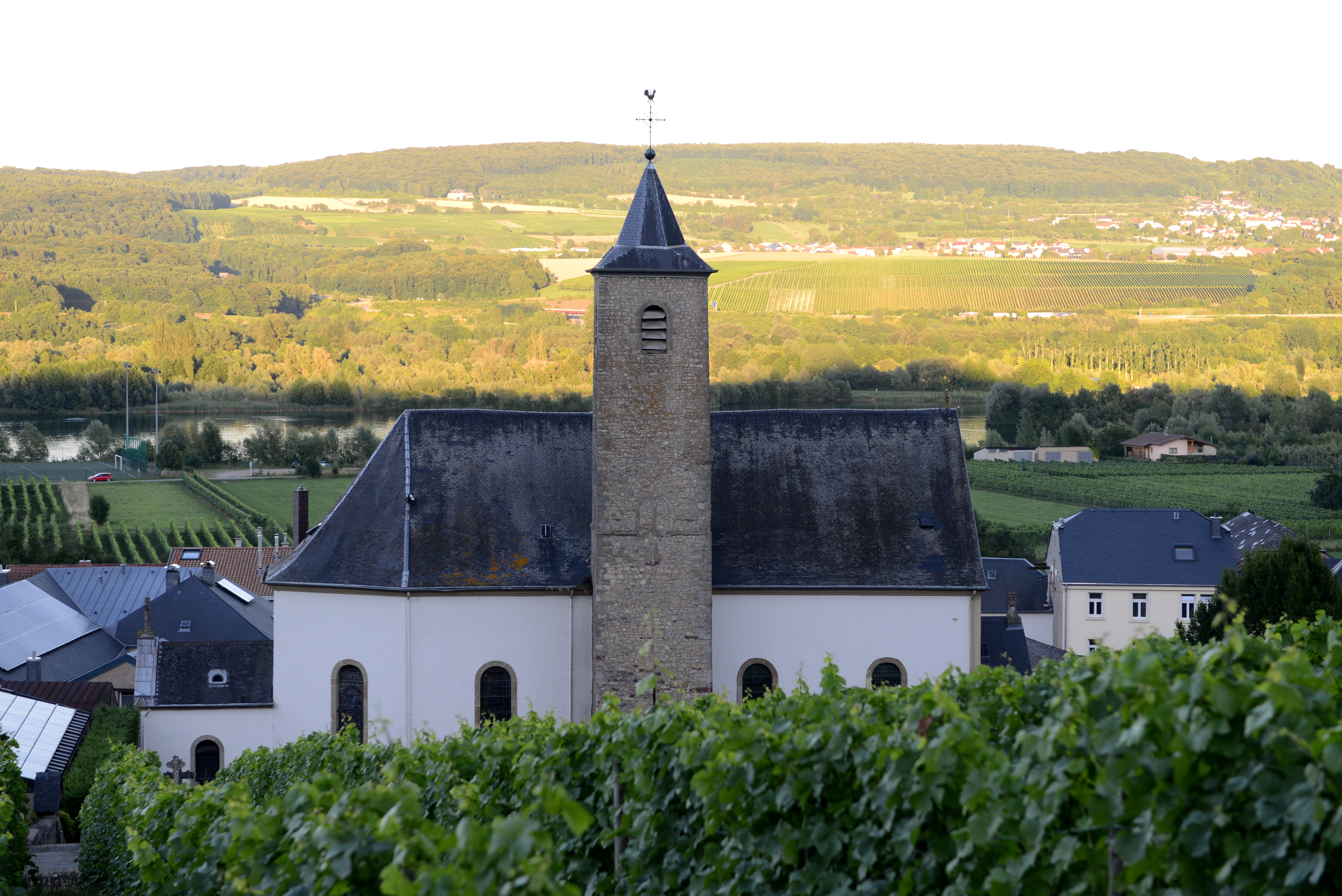 Vue vum Käpbierg op d'Kierch vu Rëmerschen.